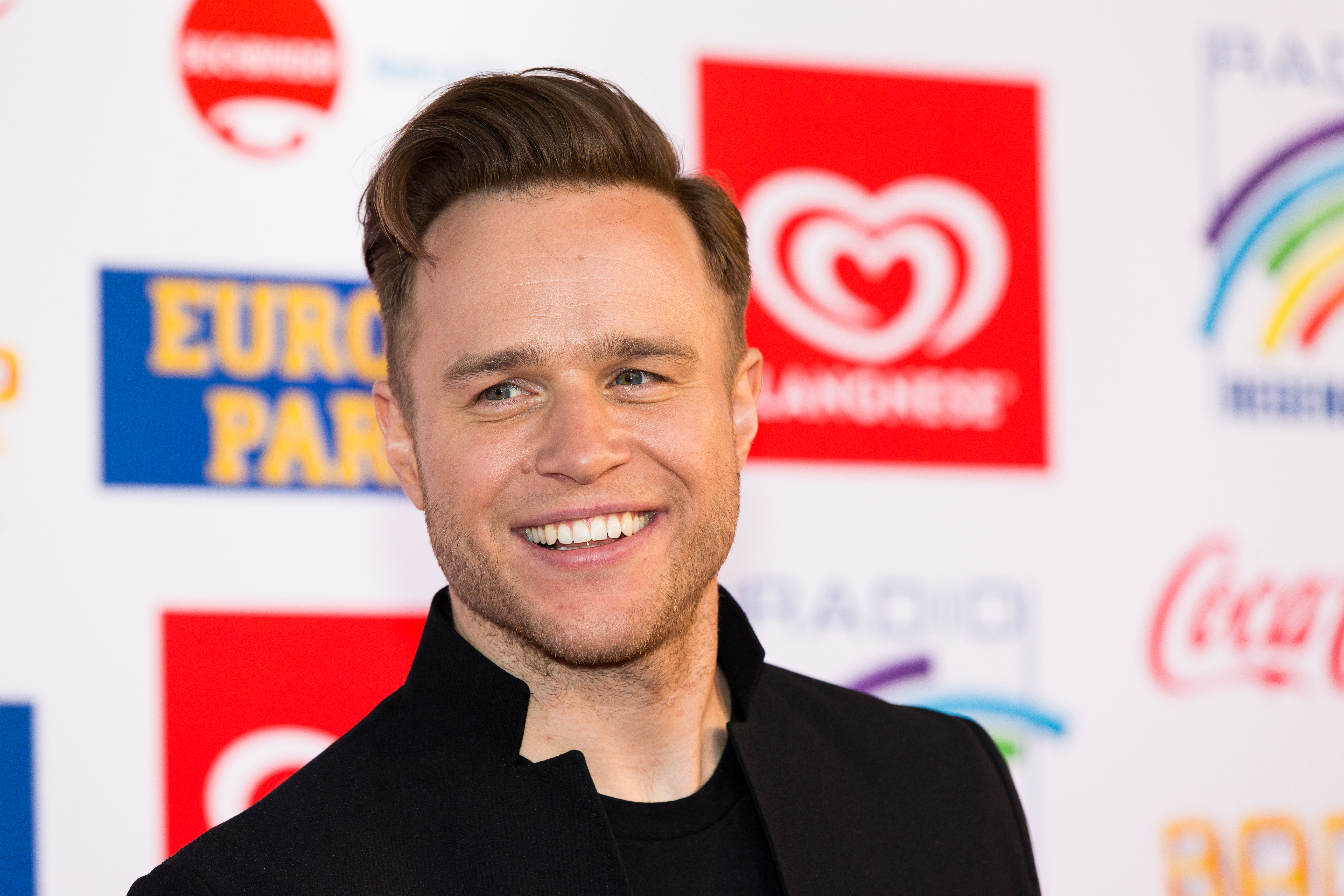 during Radio Regenbogen Award 2017 at Europapark, Rust, Baden-Württemberg, Germany on 2017-04-07, Photo: Sven Mandel